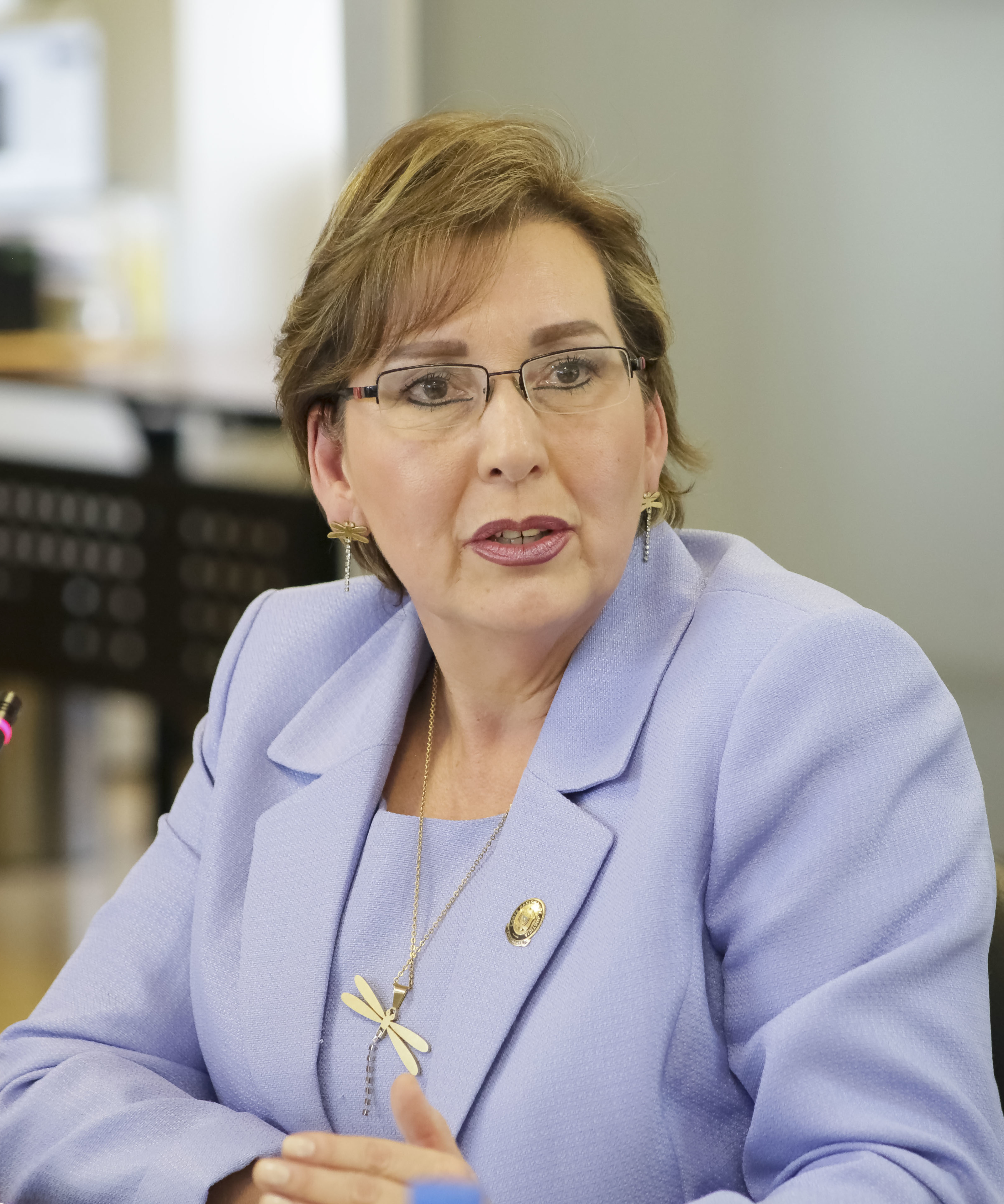 Quito 11 de Julio de 2018. - Observaciones al Informe para Primer Debate de la Ley Reformatorios del Código Orgánico de la Función Judicial, respecto de la creación de la doble instancia en materia contencioso administrativa y tributaria propuesto por la asambleísta Noralma Zambrano, así como también de la figura del error inexcusable. -Observaciones al Informe para Primer Debate del Proyecto de Ley Orgánica Reformatoria del Código Orgánico General de Procesos, así como también de la propuesta respecto de incorporar el recurso de revisión en materia no penal.- Foto: Fernando Lagla / Asamblea Nacional Quito 11 de Julio de 2018. - Observaciones al Informe para Primer Debate de la Ley Reformatorios del Código Orgánico de la Función Judicial, respecto de la creación de la doble instancia en materia contencioso administrativa y tributaria propuesto por la asambleísta Noralma Zambrano, así como también de la figura del error inexcusable. -Observaciones al Informe para Primer Debate del Proyecto de Ley Orgánica Reformatoria del Código Orgánico General de Procesos, así como también de la propuesta respecto de incorporar el recurso de revisión en materia no penal.- Foto: Fernando Lagla / Asamblea Nacional